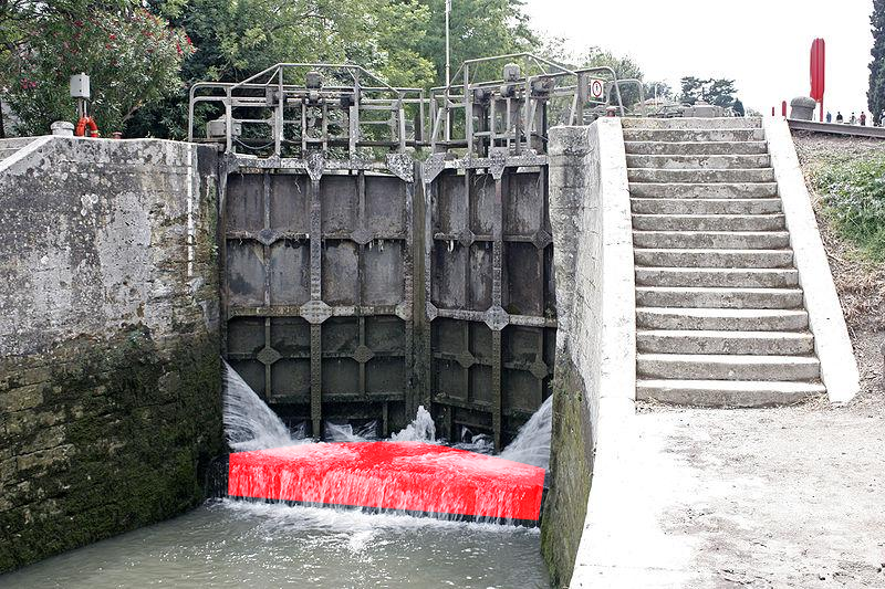 L' écluse n° 8, du quai de l' écluse n° 7. Noter aussi sur les plages de manœuvre les bites d'amarrage (Toutes classées)